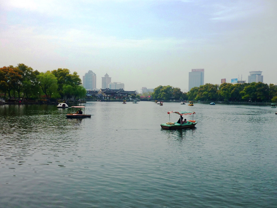 宁波月湖